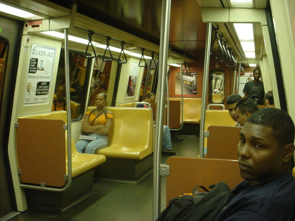 Foto tomada por mi en el metro de Caracas. la cual entrego para ser usada libremente bajo licencia GNU —ArielR 04:30, 10 April 2006 (UTC)